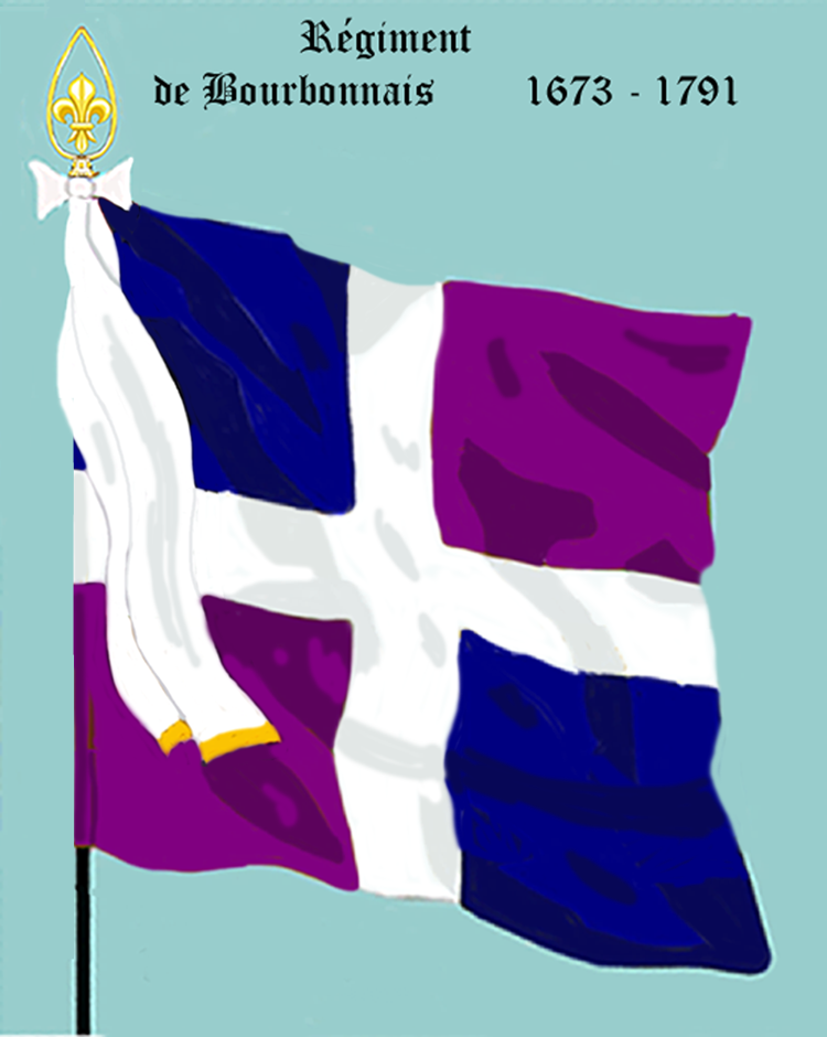 Ordonnanzfahne eines königlich französischen Infanterie-Regiments. - Entnommen und überarbeitet aus: „LES UNIFORMES ET LES DRAPEAUX DE L'ARMÉE DU ROI“ Marseille 1899. (Drapeau d'Ordonnance d' un régiment française d'infanterie royale.)